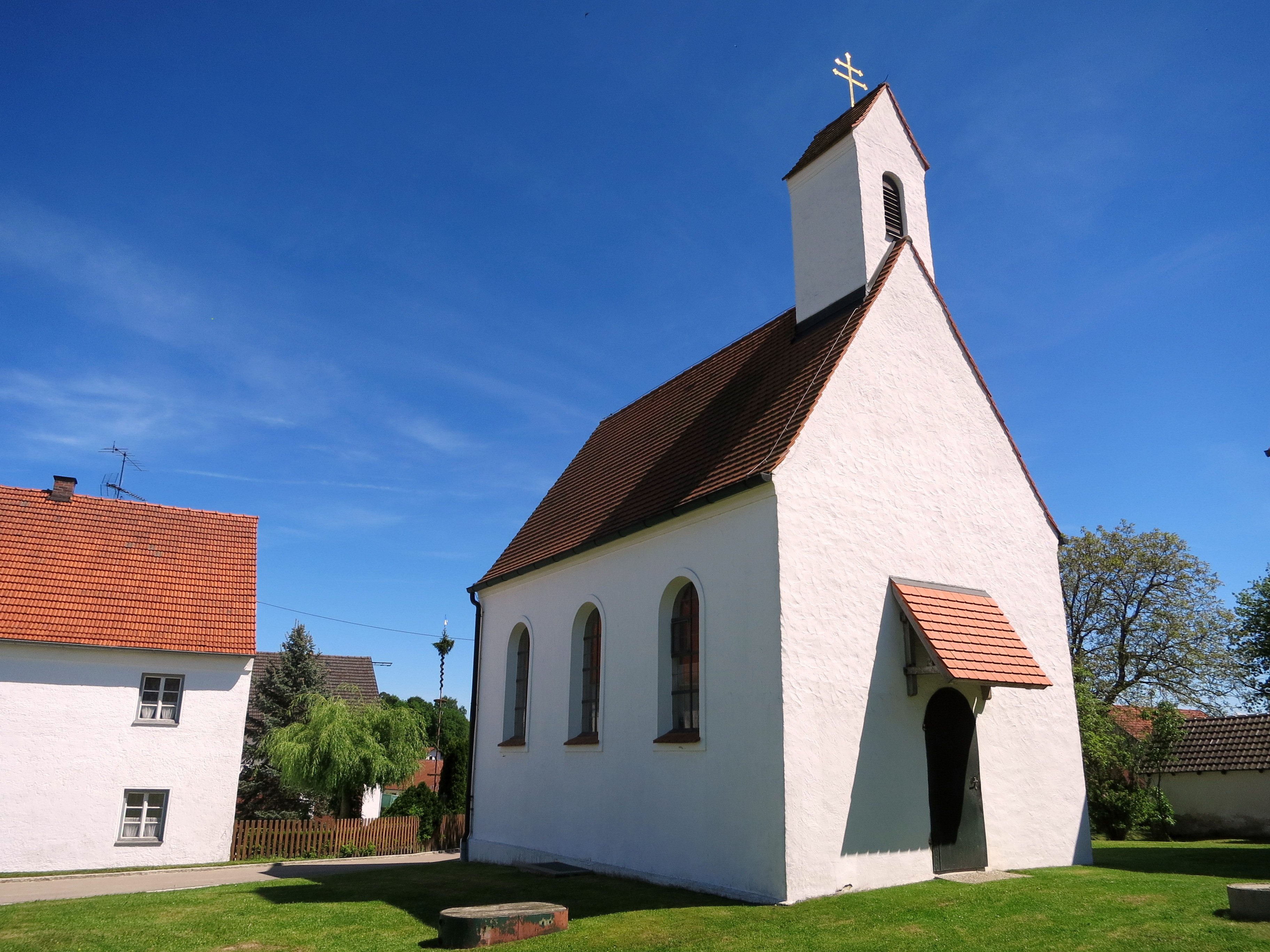 Diese Ortskapelle steht im OT Dietersdorf der Gemeinde Schweitenkirchen, Landkreis Pfaffenhofen an der Ilm.